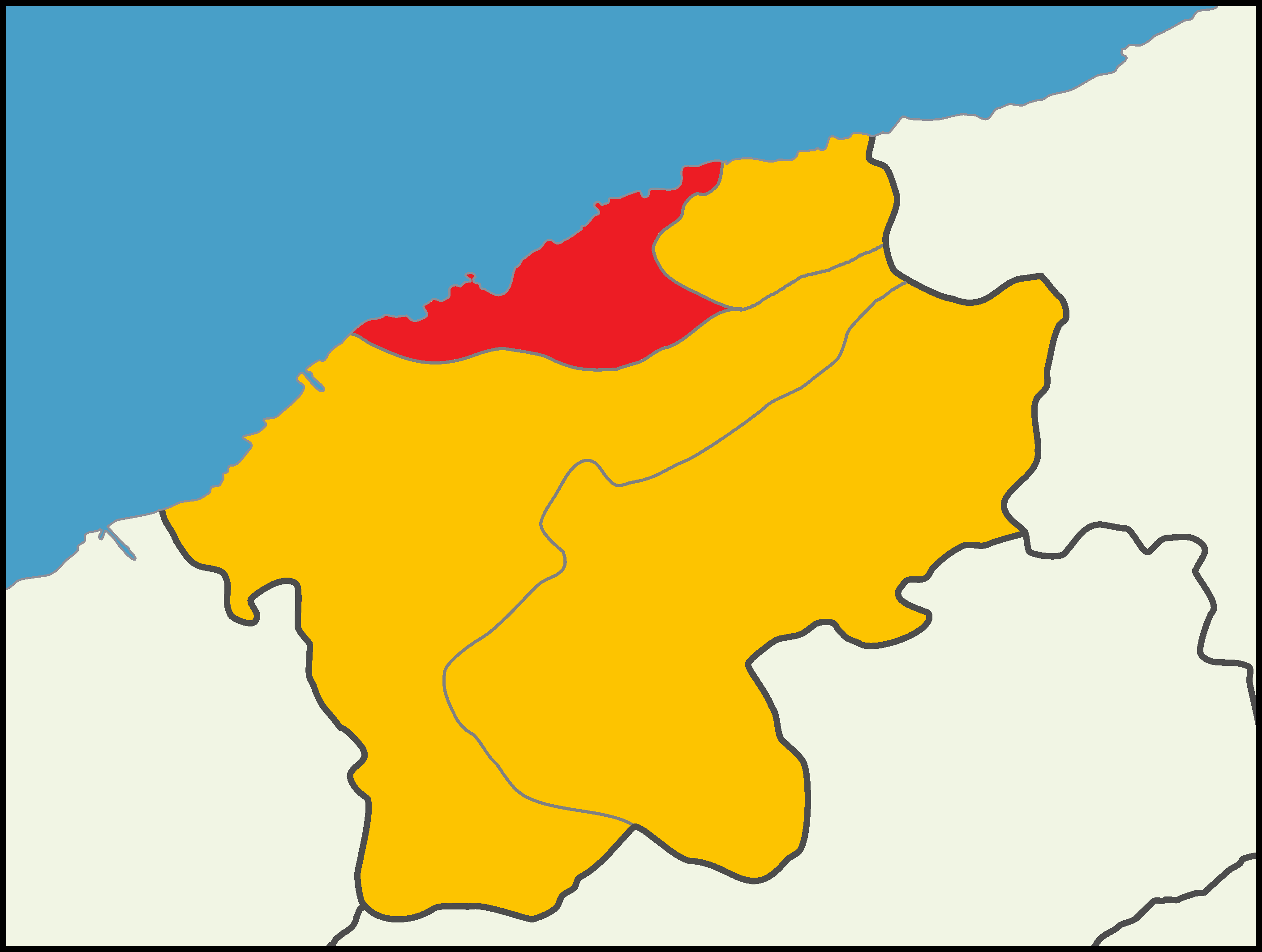 Bartın'da 2014 Türkiye cumhurbaşkanlığı seçimi sonuçları